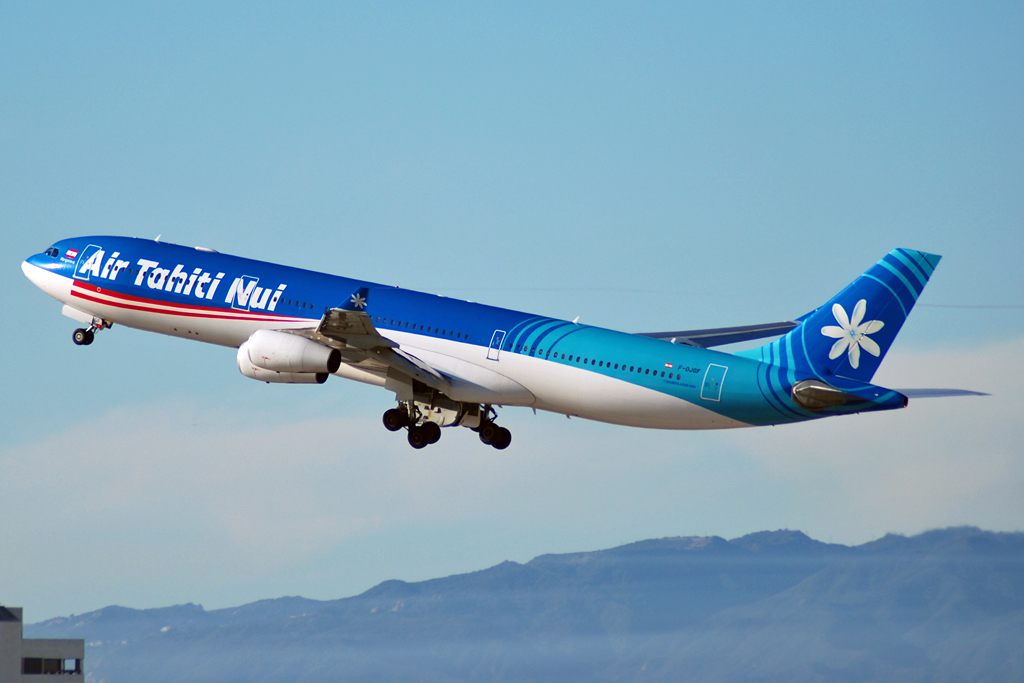 F-OJGF